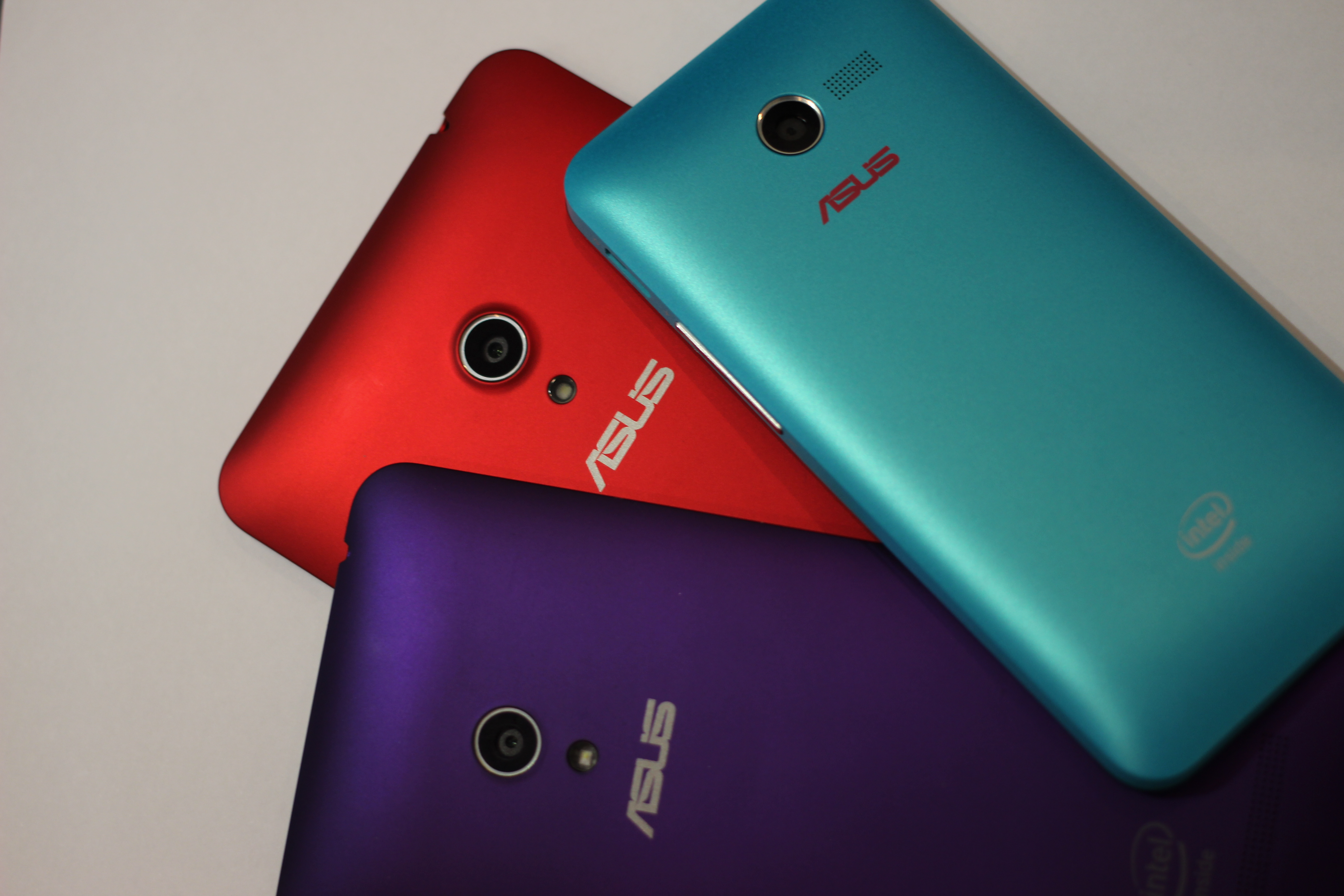 ASUS Zenphone